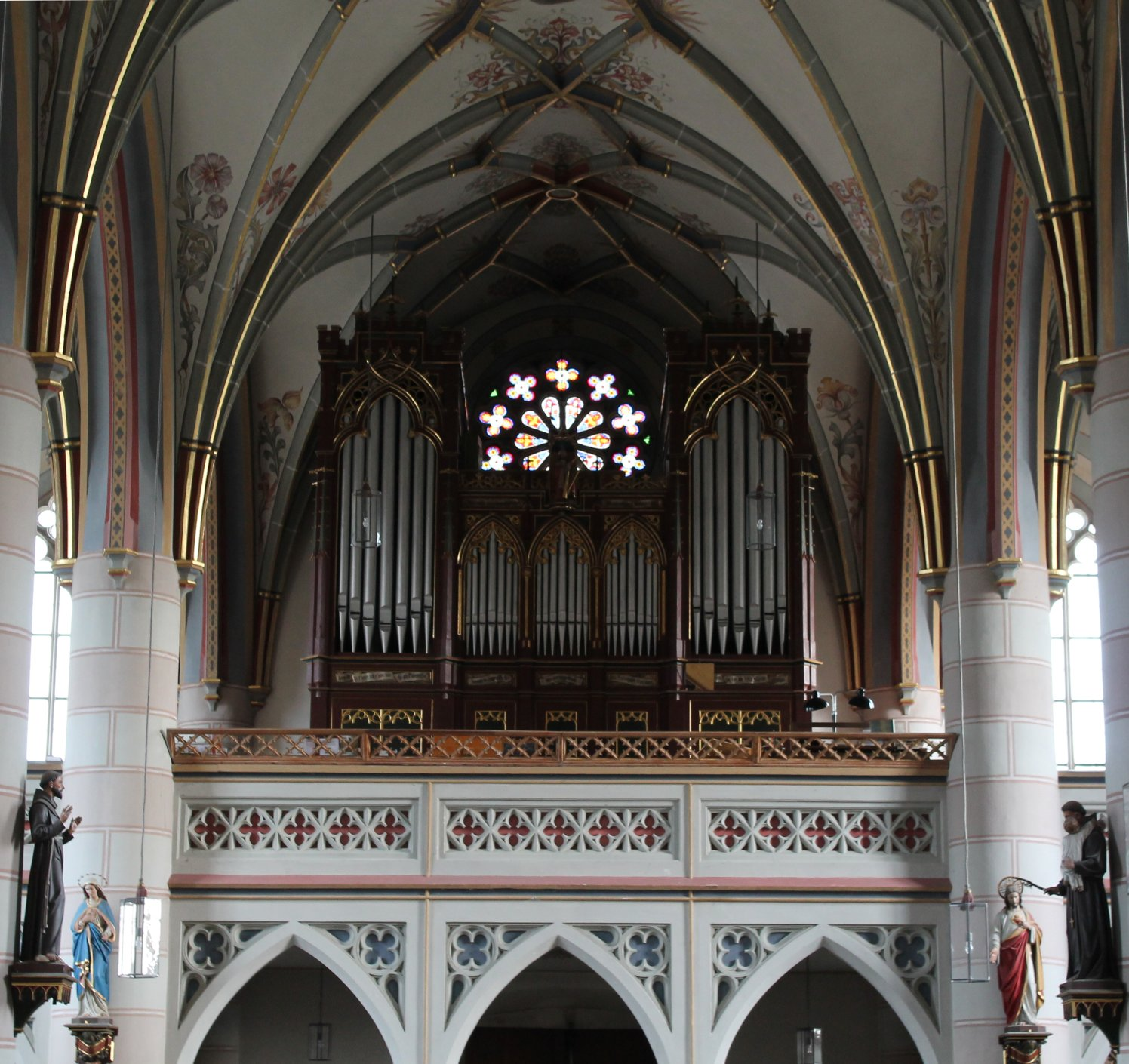 Orgel von St. Laurentius in Obing (1870, Max Maerz op. 90, II/22)